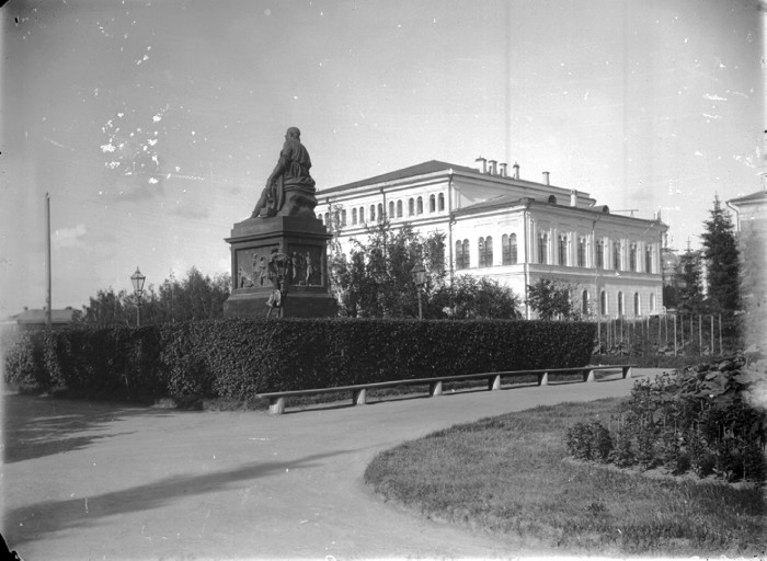 Вид на памятник Державину и здание Благородного собрания. Казань.